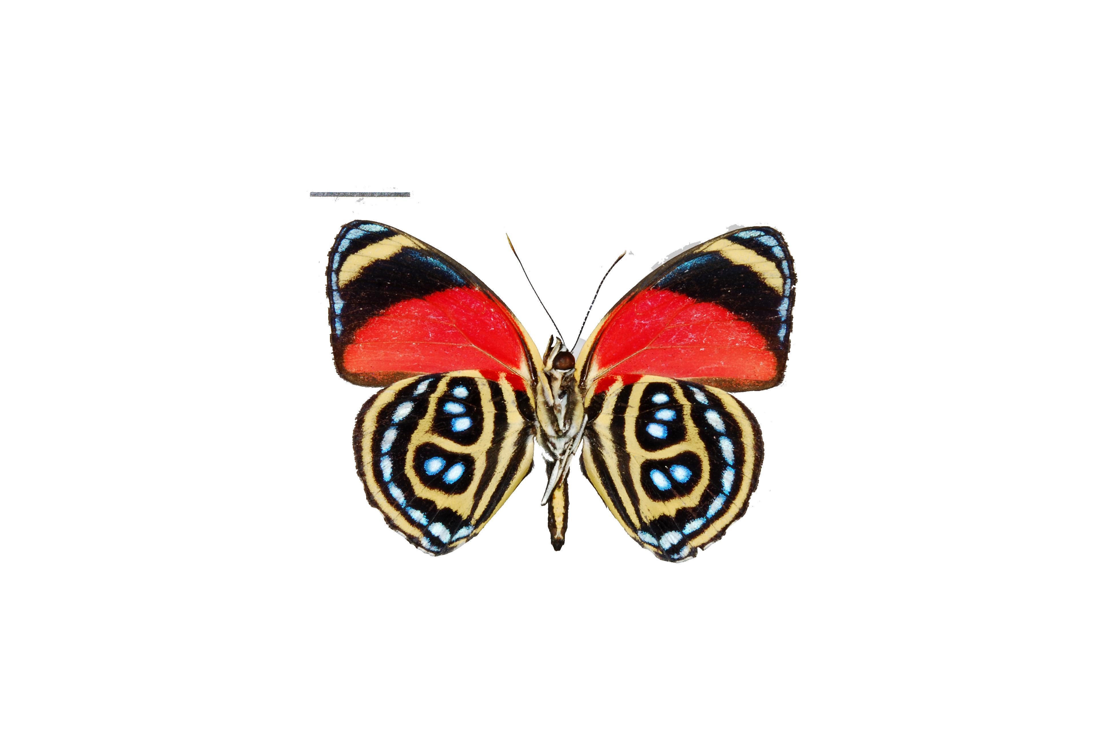 Nymphalidae eastern Ecuador